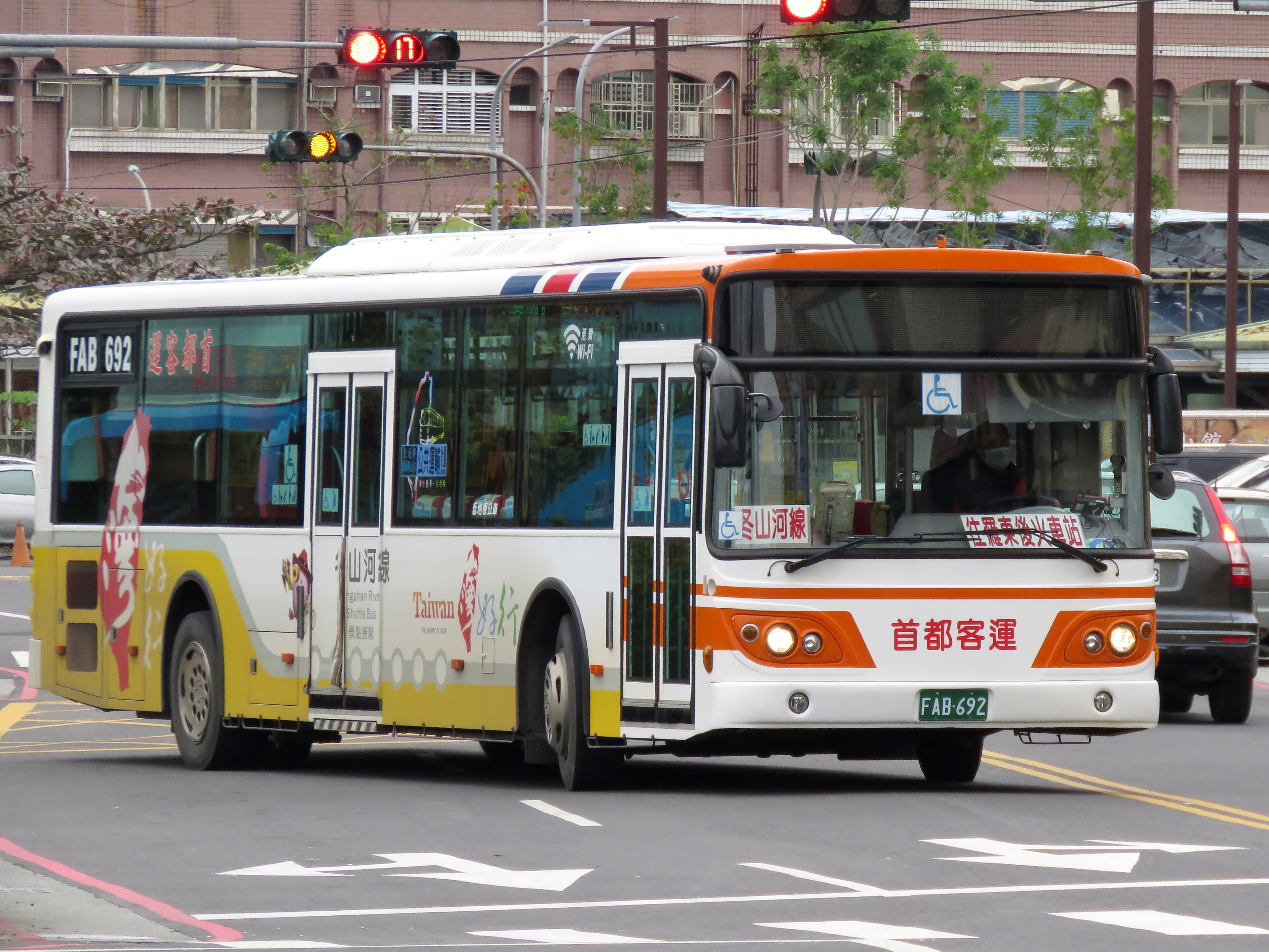 2016 DAEWOO BS120CN（五期引擎）FAB-692 暫停服務